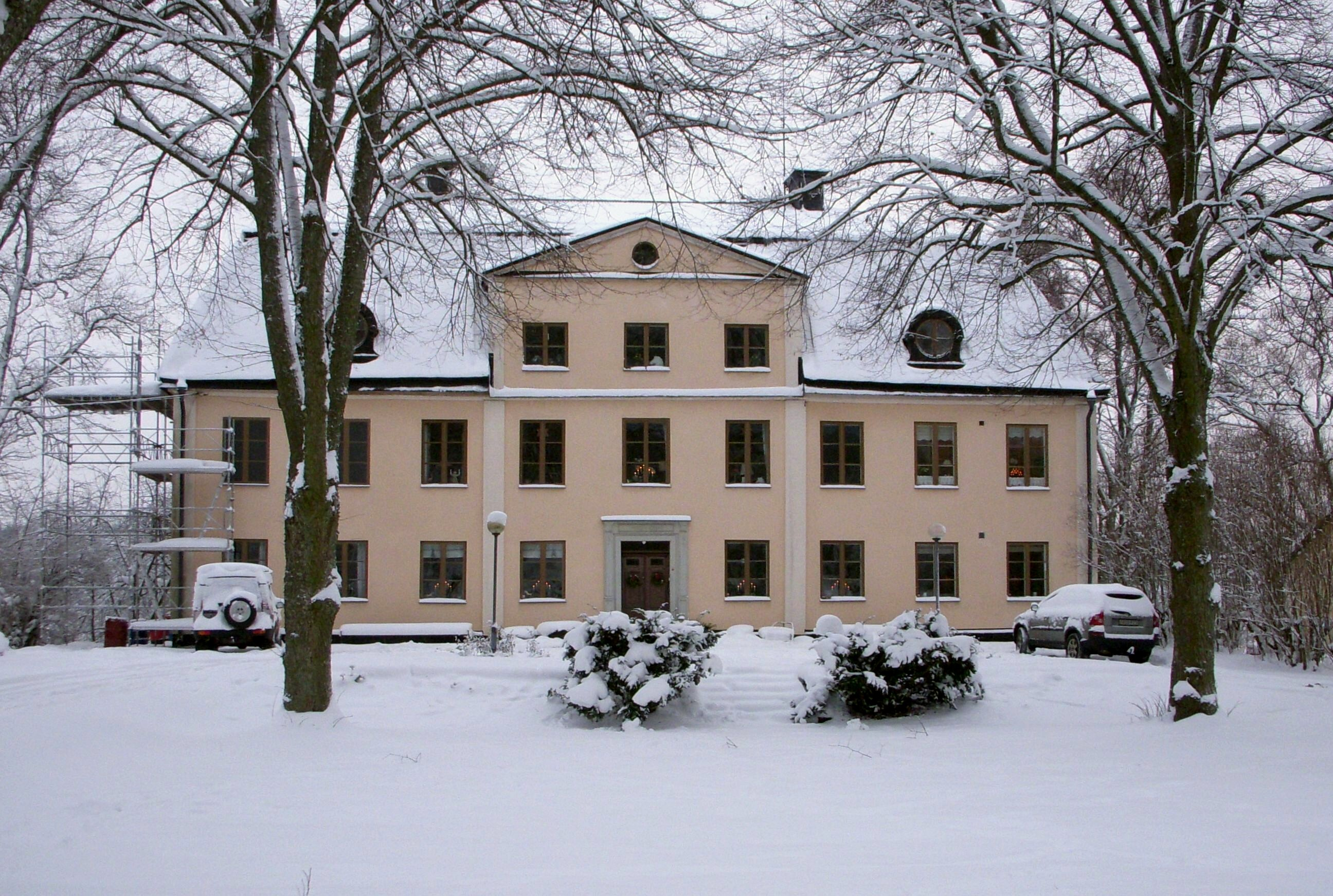 Ågesta gård, Huddinge